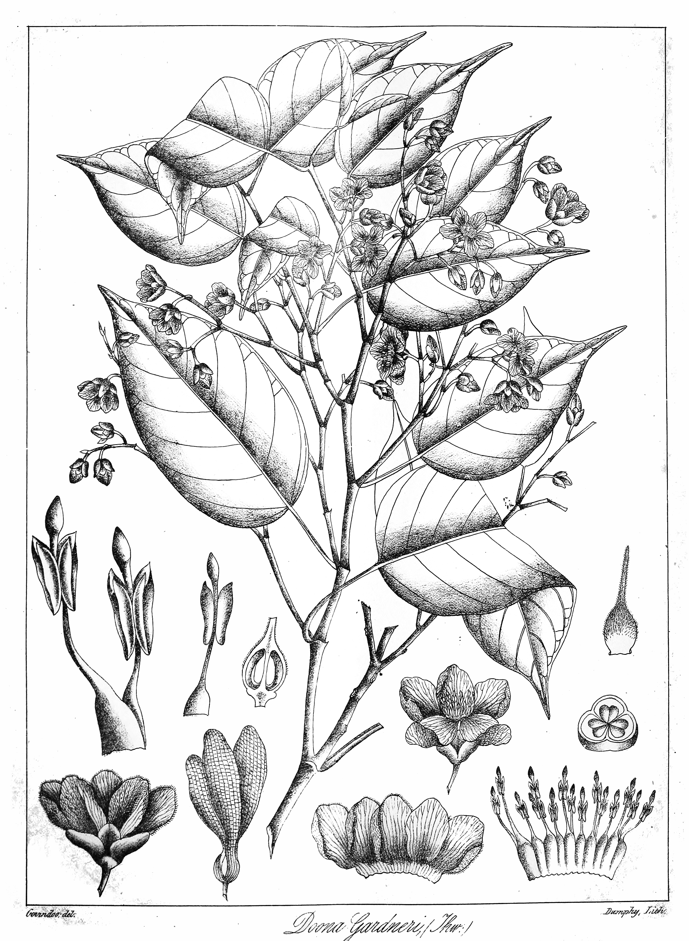 Doona gardneri'